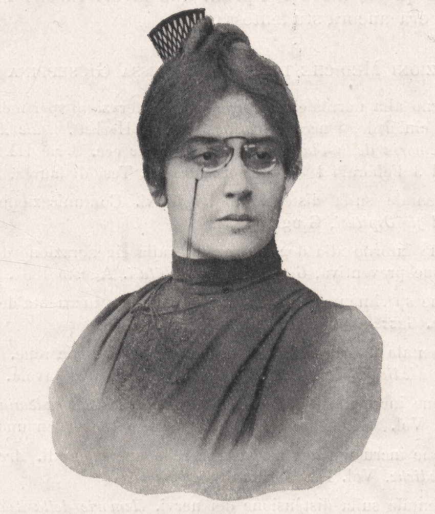 Ritratto della dottoressa Giuseppina Cattani